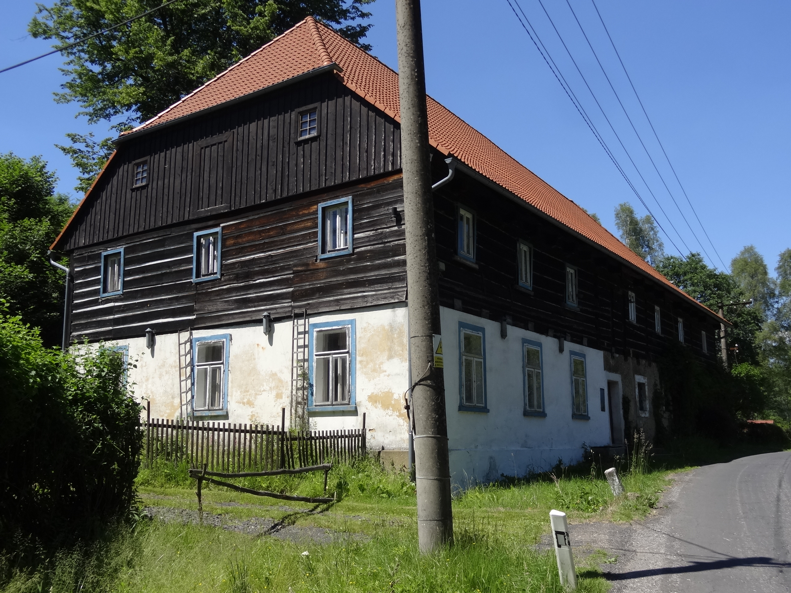 Usedlost čp. 31, Falknov 31, Falknov.